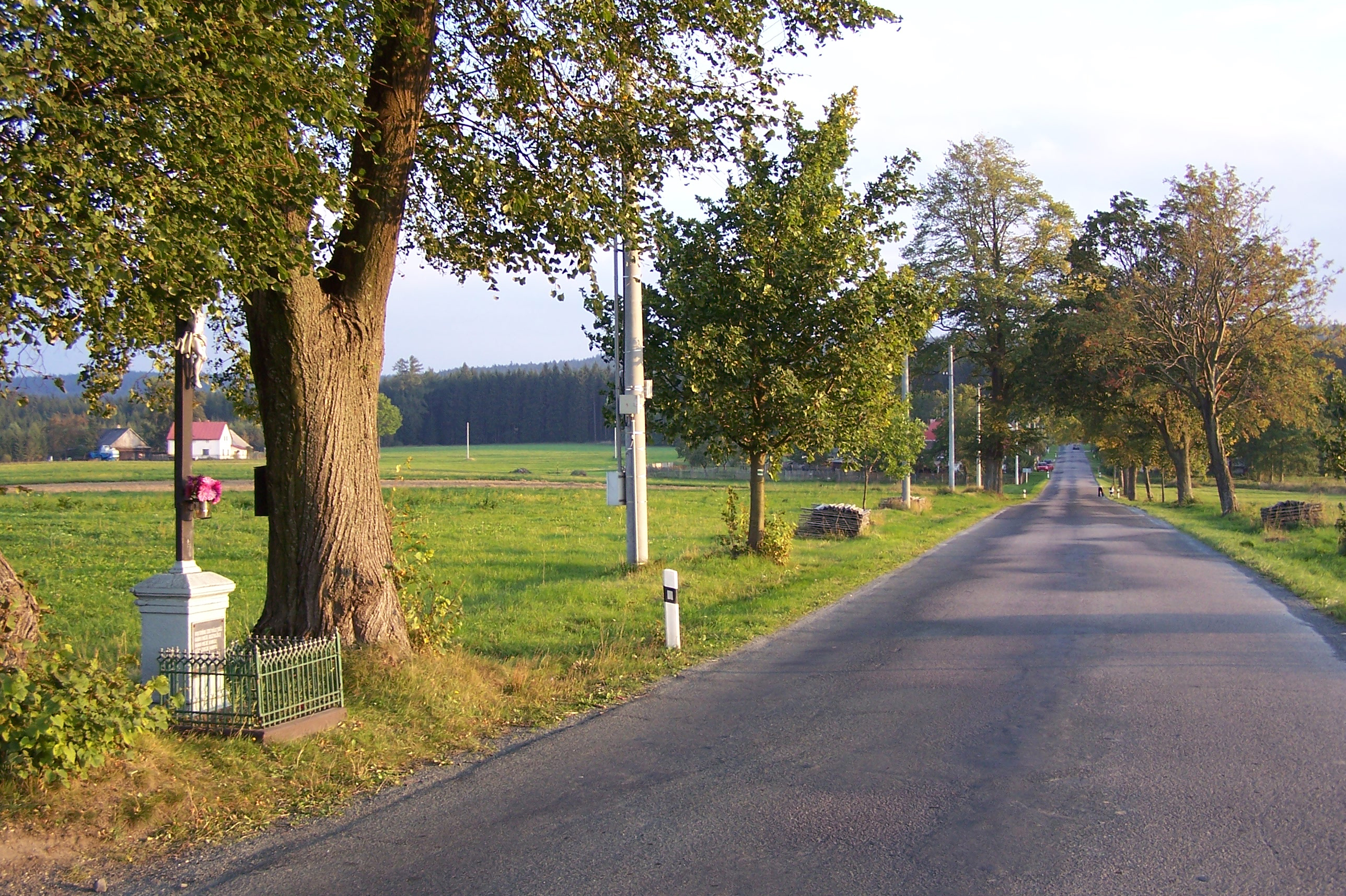 Herálec (okres Žďár nad Sázavou): část Kocanda z pohledu od Herálce, silnice II/350.